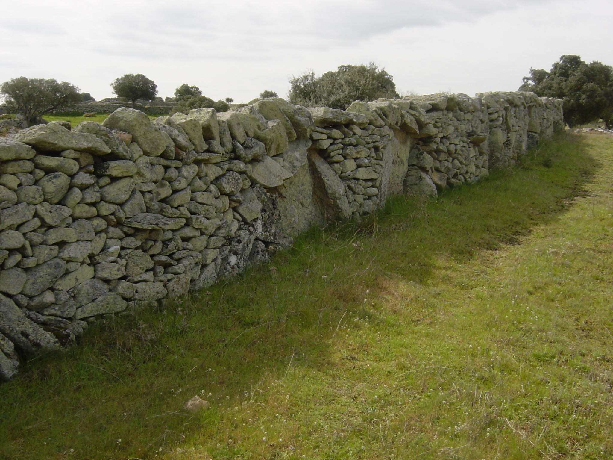 CERCA DE PIEDRA EN SAYAGO, ESPAÑA